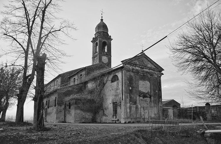 Il retro della chiesa